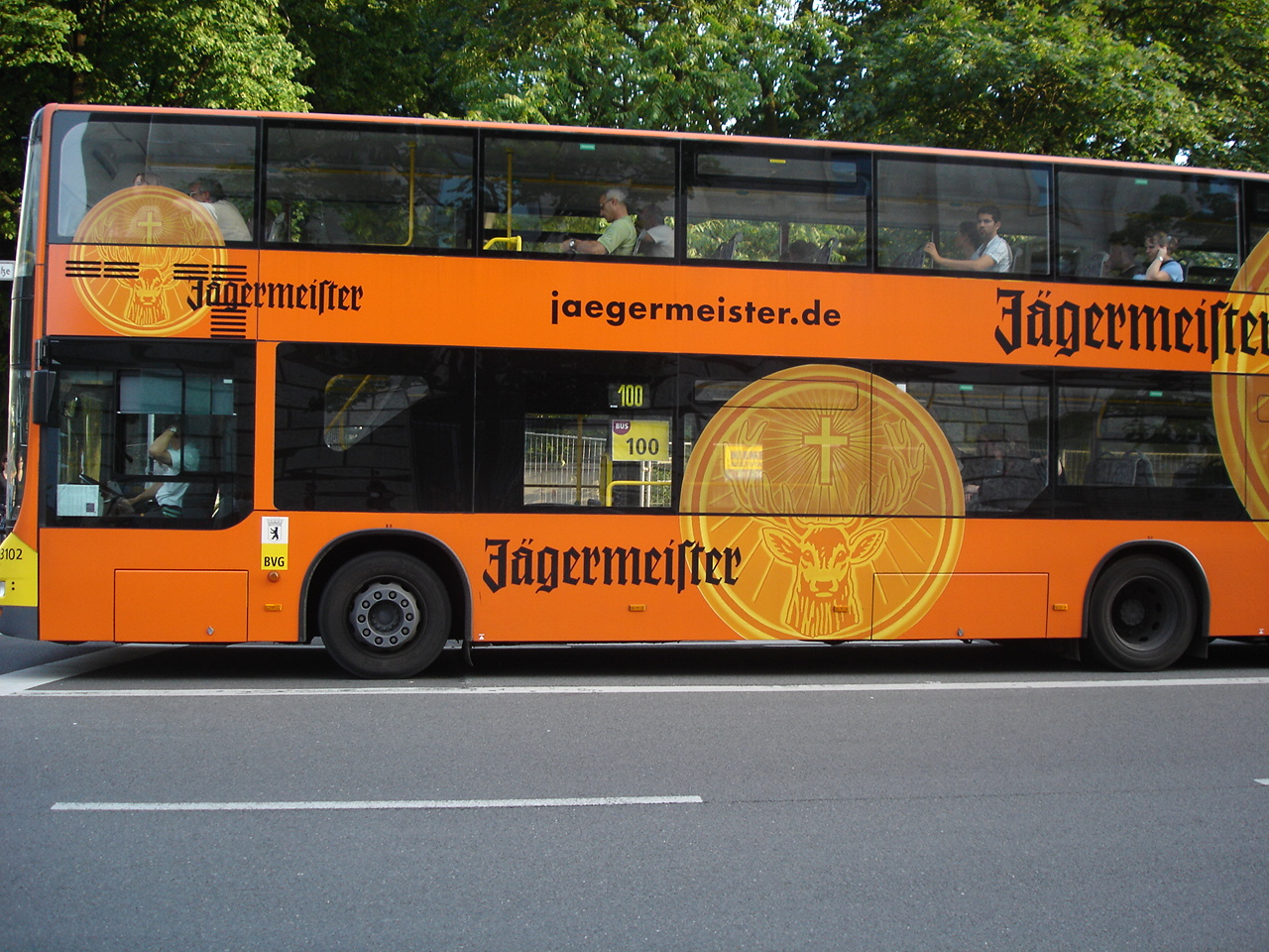 Buslinie 100 mit Jägermeister Reklame in Berlin